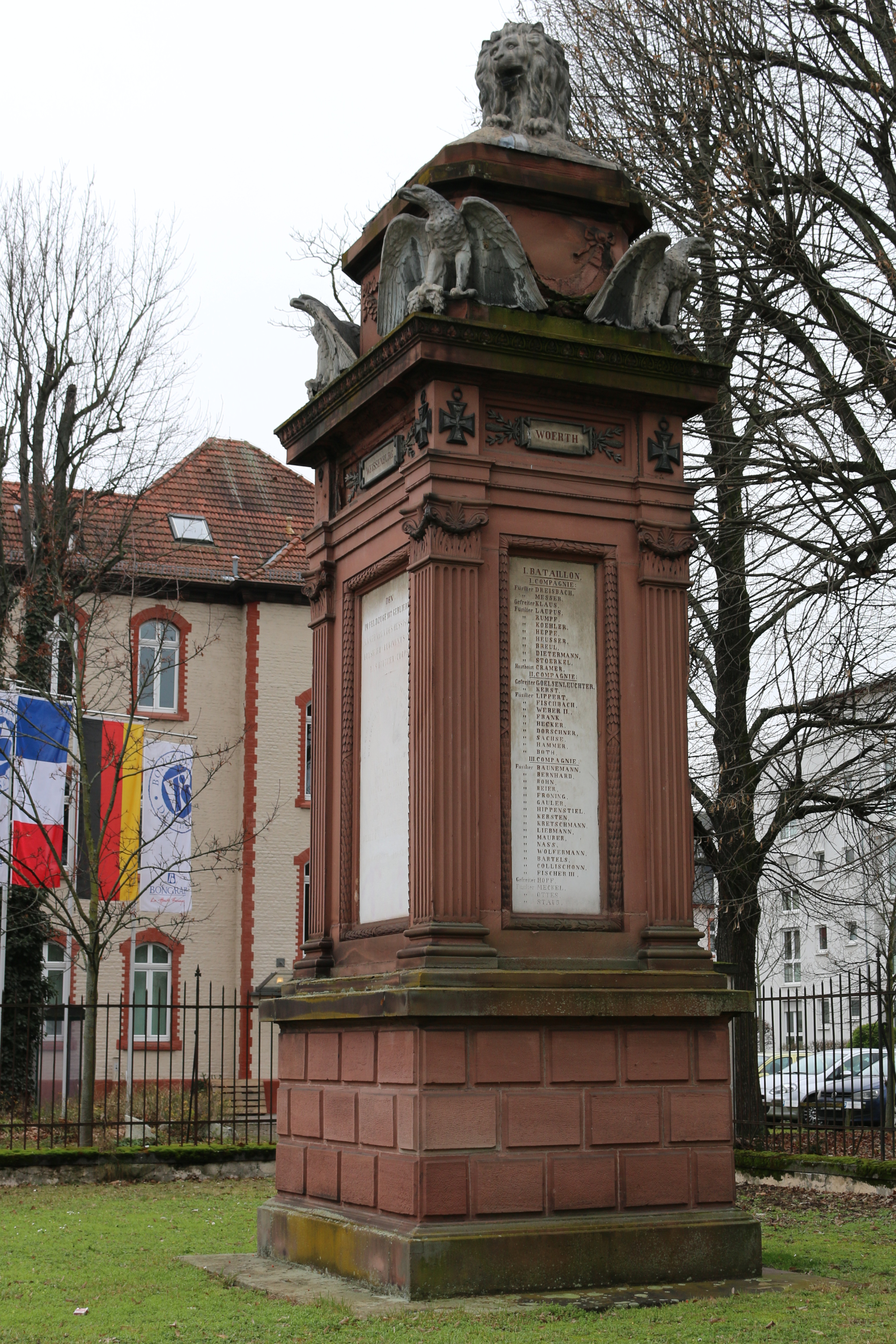 Denkmal für das 80. Infanterieregiment im Einsatz 1870/71 in Frankreich